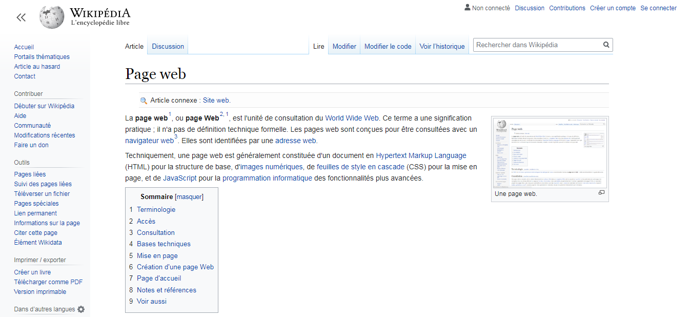 Page web Wikipédia Français